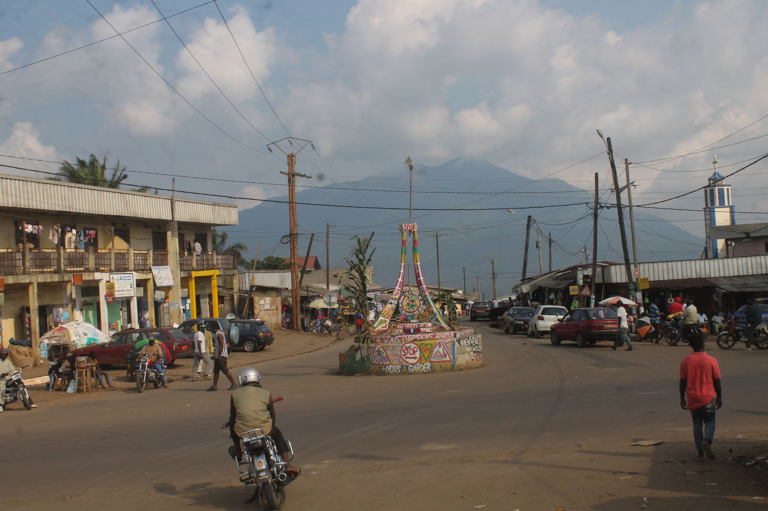 Vue du mont Manégoumba a partir du carrefour LELE